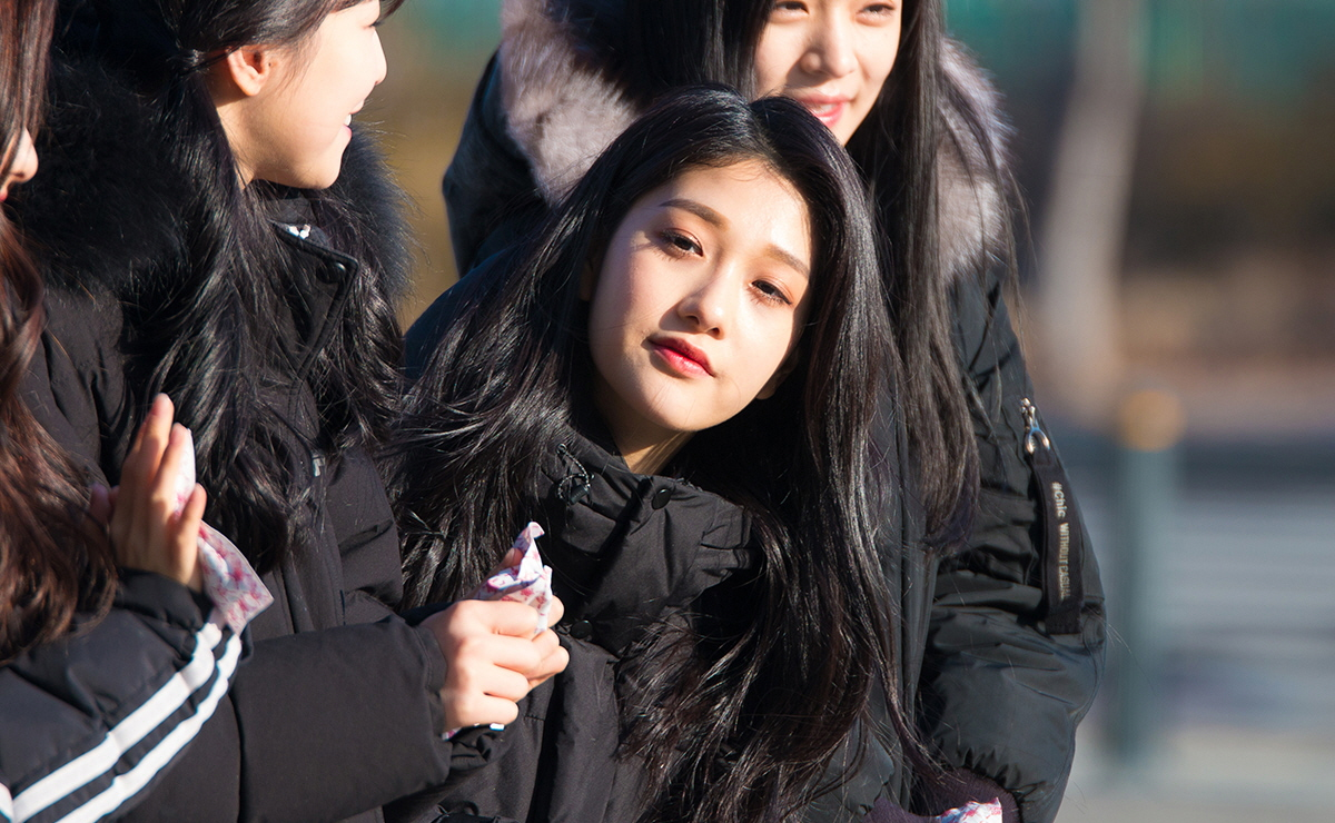 20180127 프로미스 9 음악중심 미니팬미팅